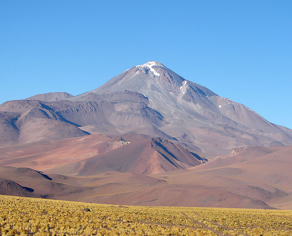 Llullaillaco del Este